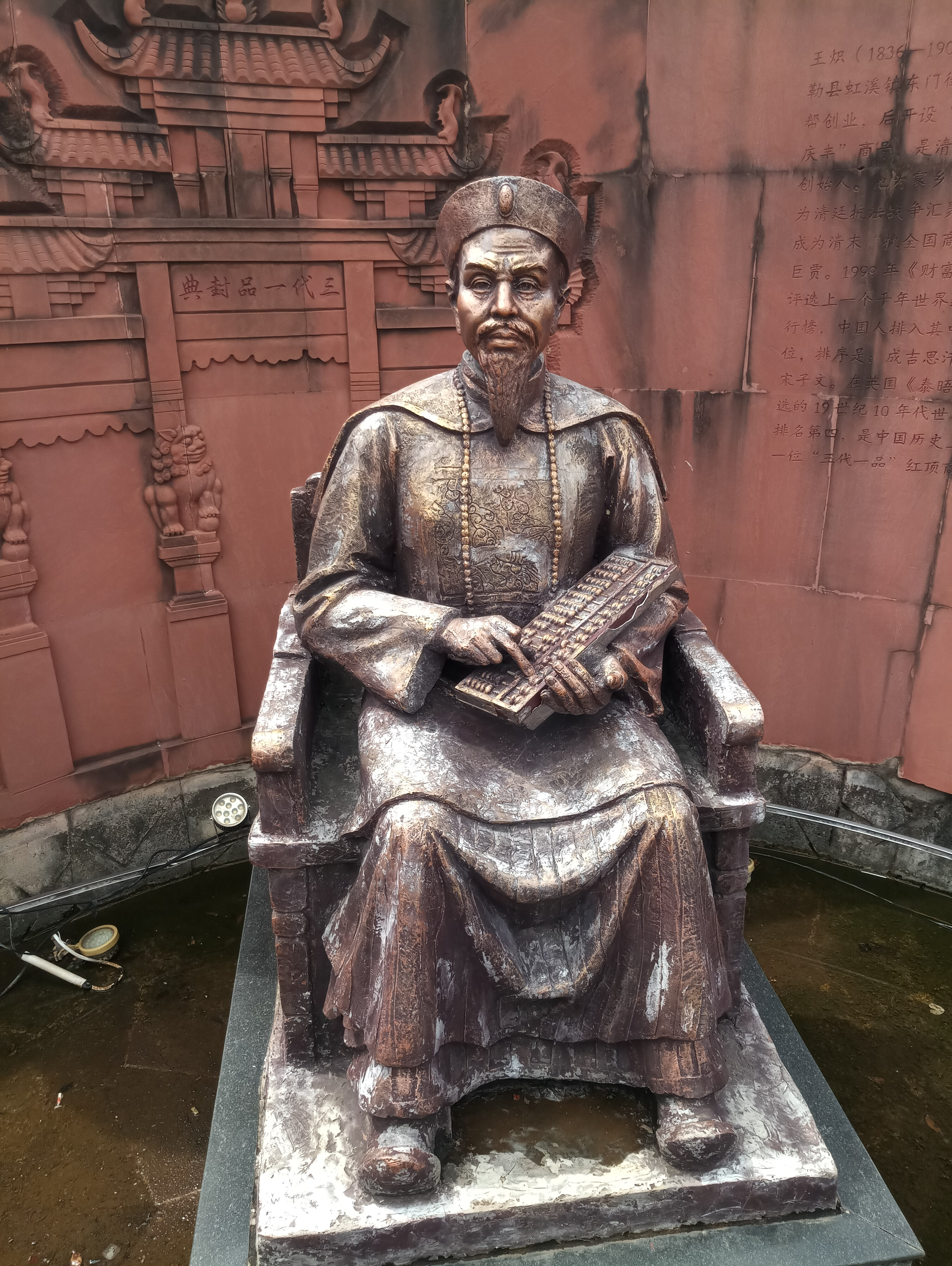 中文（中国大陆）: 弥勒湖泉名人文化园-王炽像